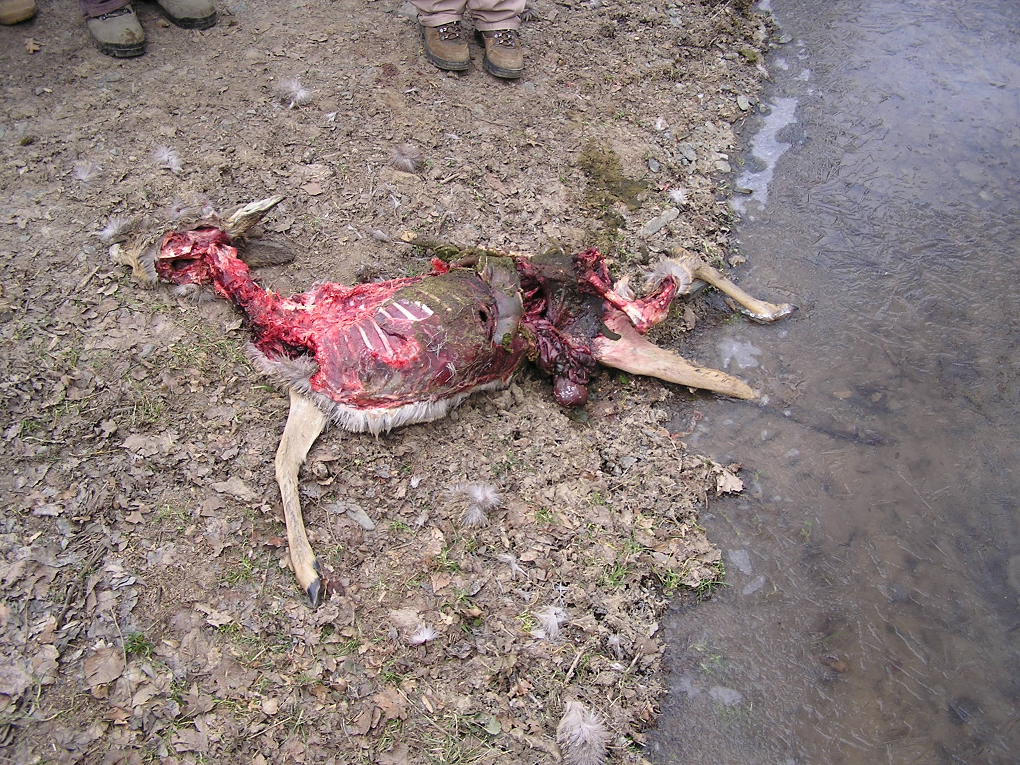 Mrtvá srna